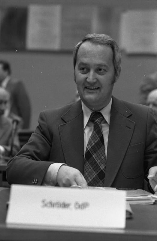 Hearing zum Thema "Radikalenerlaß" im Innendienst des Bundestages